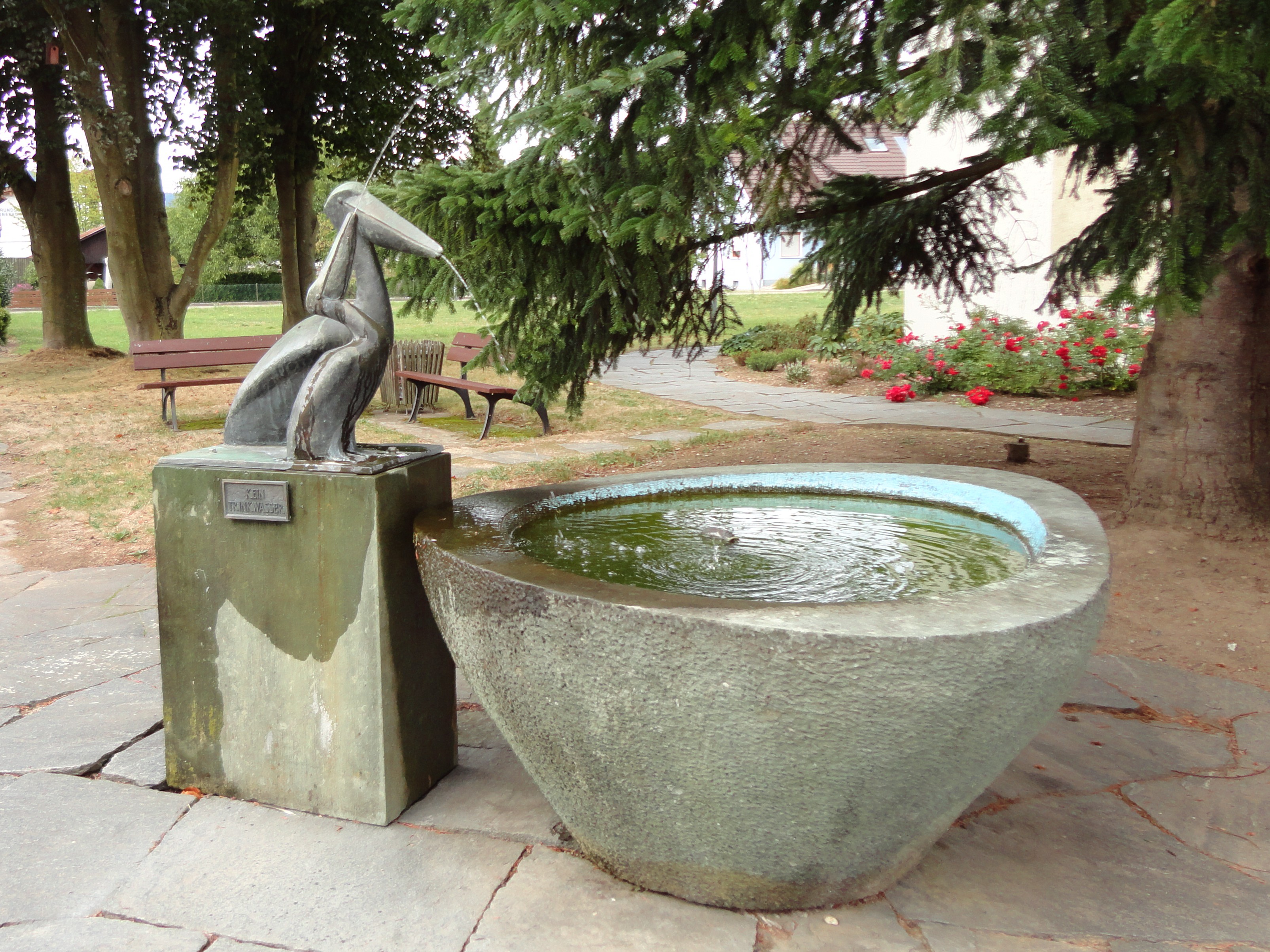 Brunnen neben der katholischen Kirche St. Blasius in Biberach (Baden).